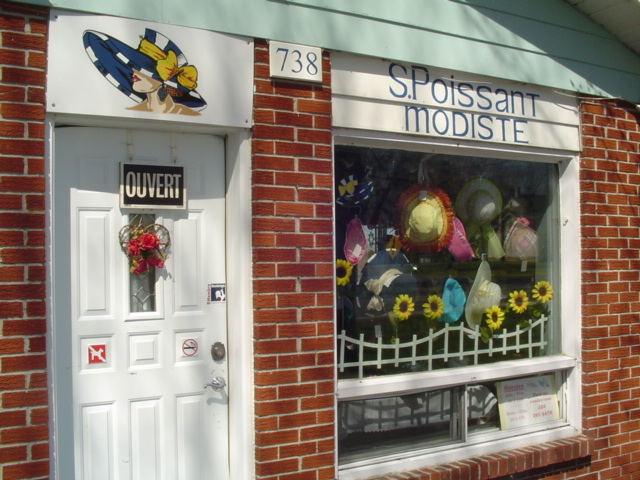 Boutique Suzanne Poissant Modiste à St-Valentin